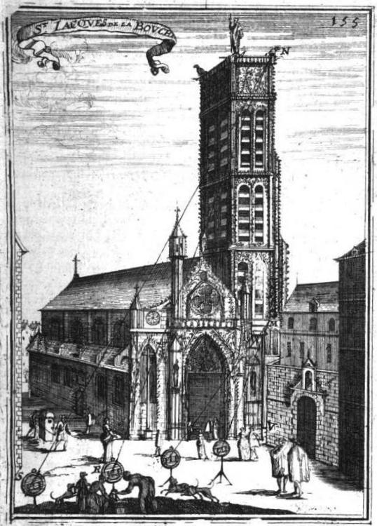 "St. Jacques de la Bouche[rie]".